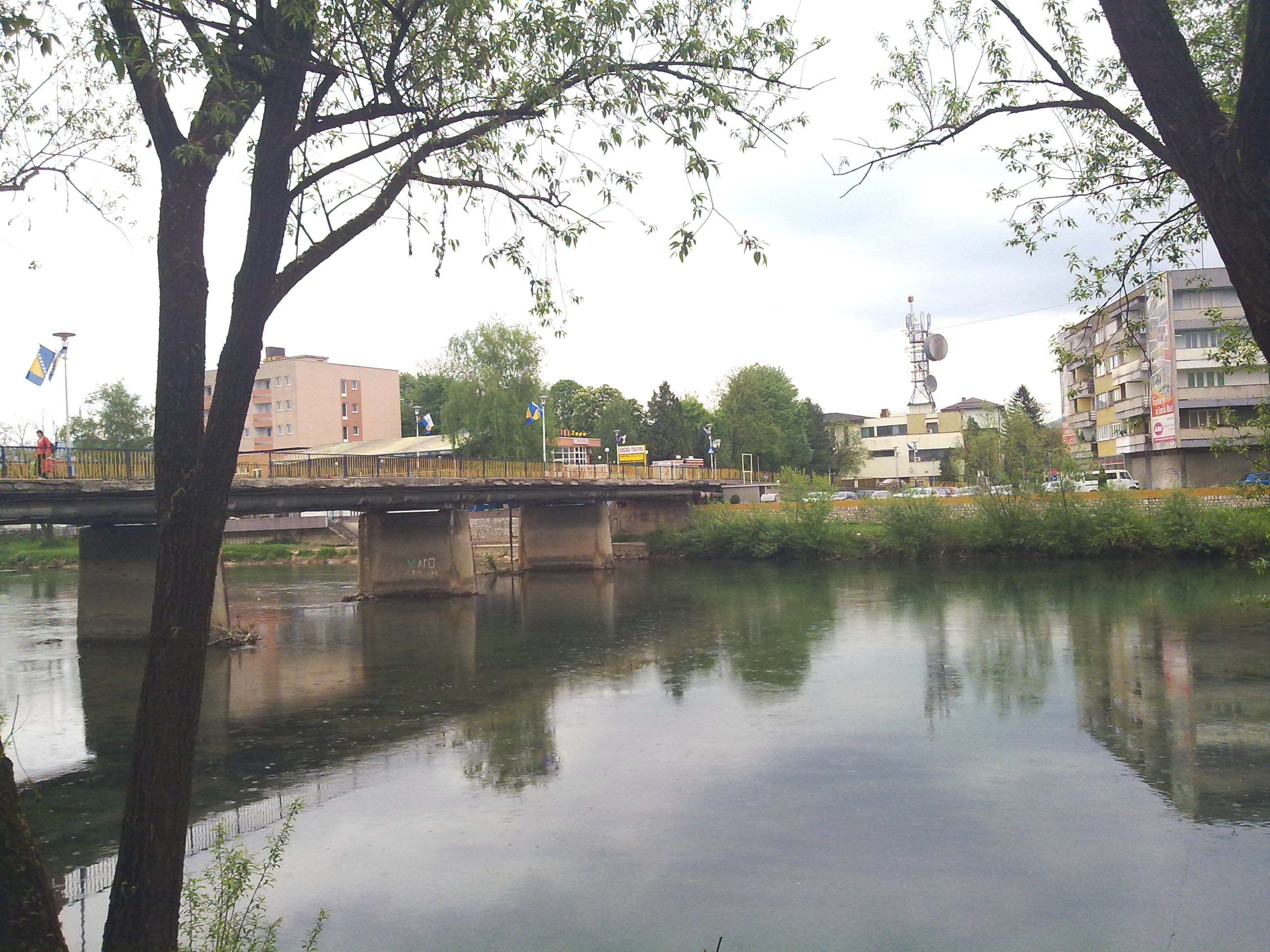 Gradski most